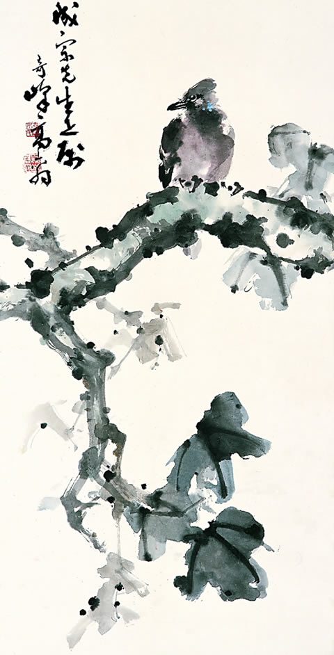 中文（香港）: 高奇峰所繪的鳥